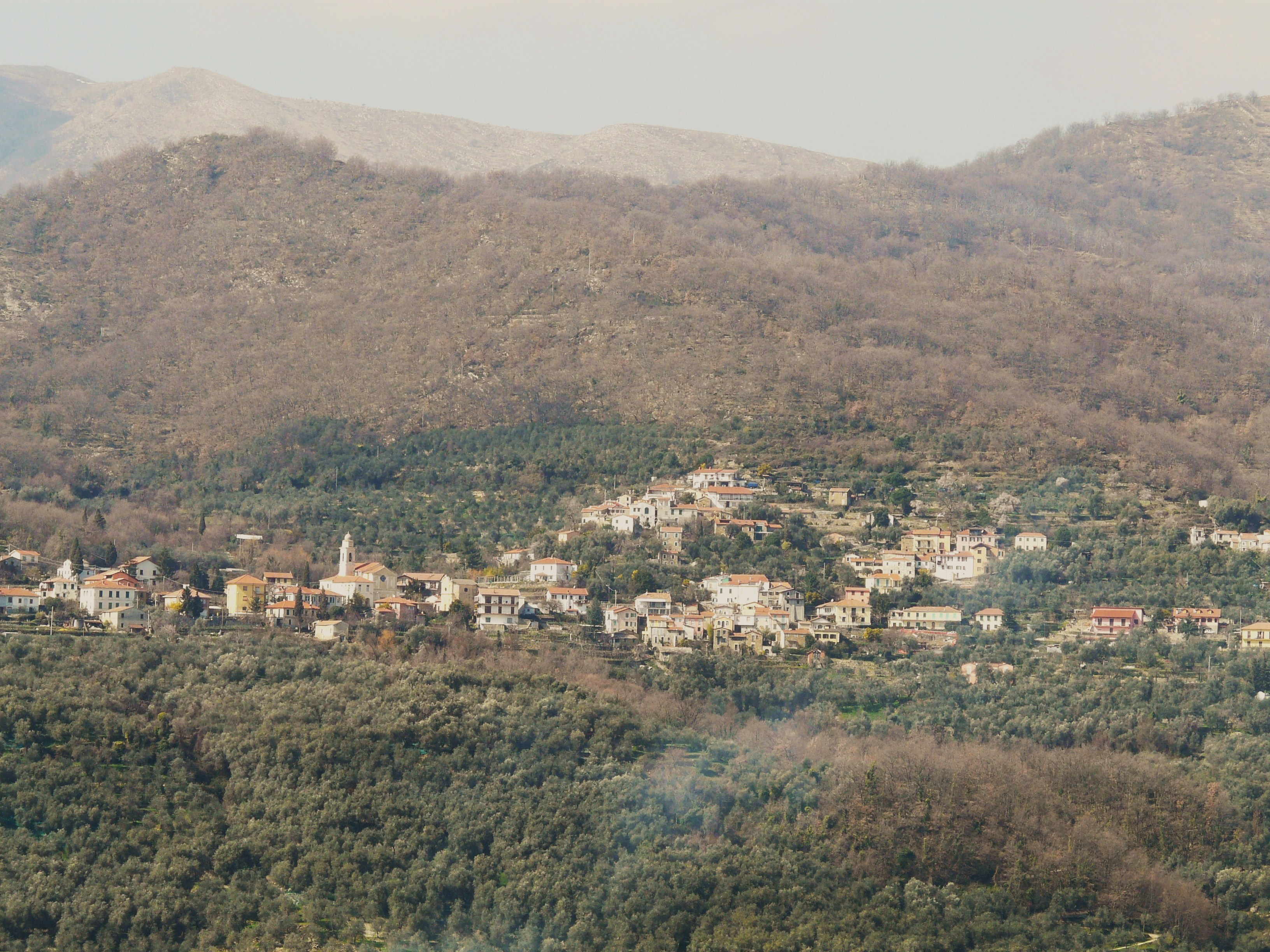 Pantasina, Vasia, Liguria, Italia